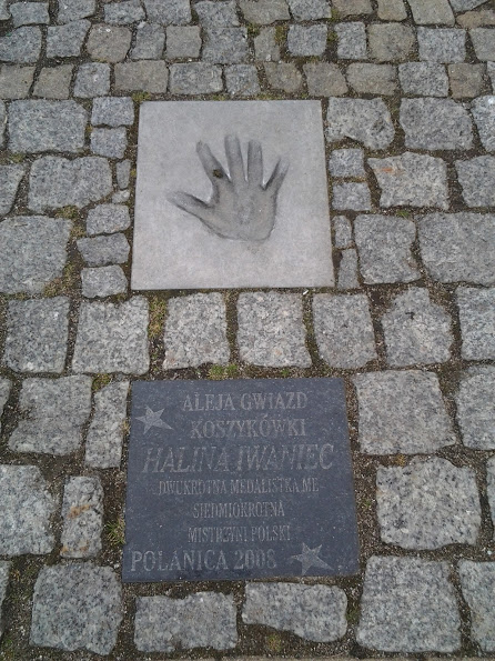 Tablica pamiątkowa z odciskiem dłoni Haliny Iwaniec w Polanicy